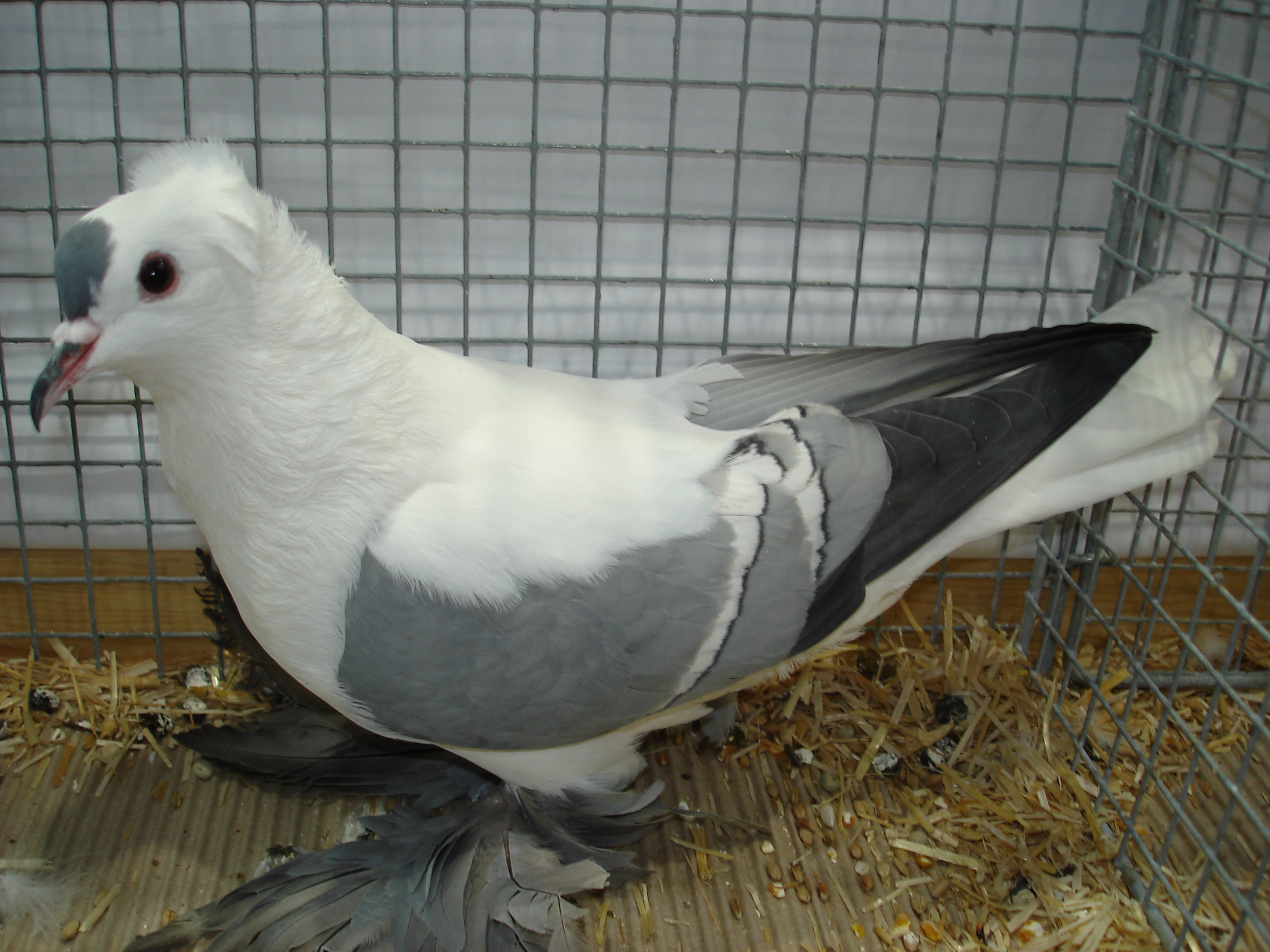 Zdjęcie saksońkiej czajki